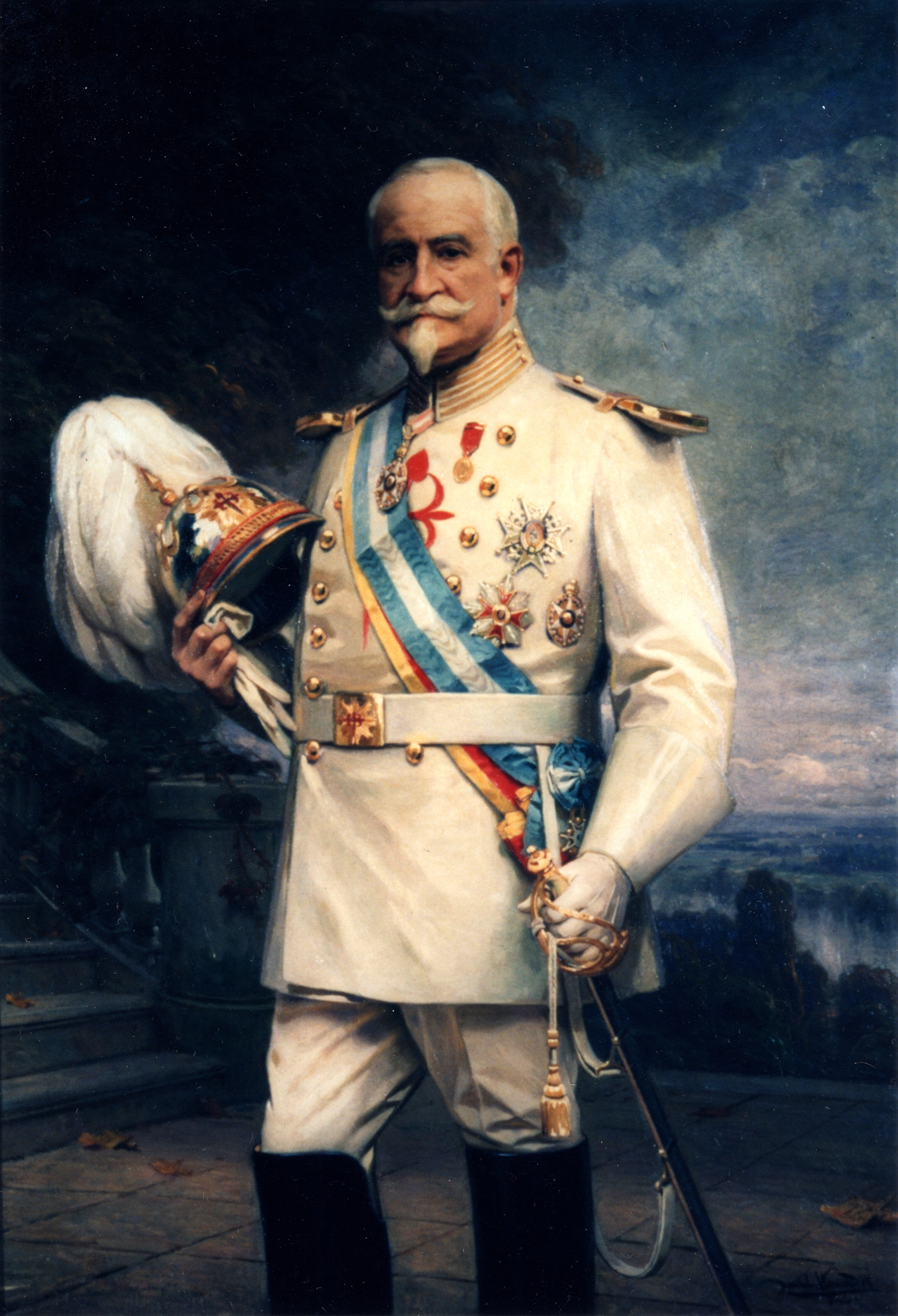 Retrato del político y diplomático peruano Juan Mariano de Goyeneche y Gamio (1834-1924), III conde de Guaqui. El retratado viste el uniforme de gala de la Orden de Santiago, de la que era caballero.